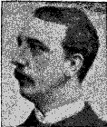 Bild av Johan Östberg från Svenskt biografiskt handlexikon 1906